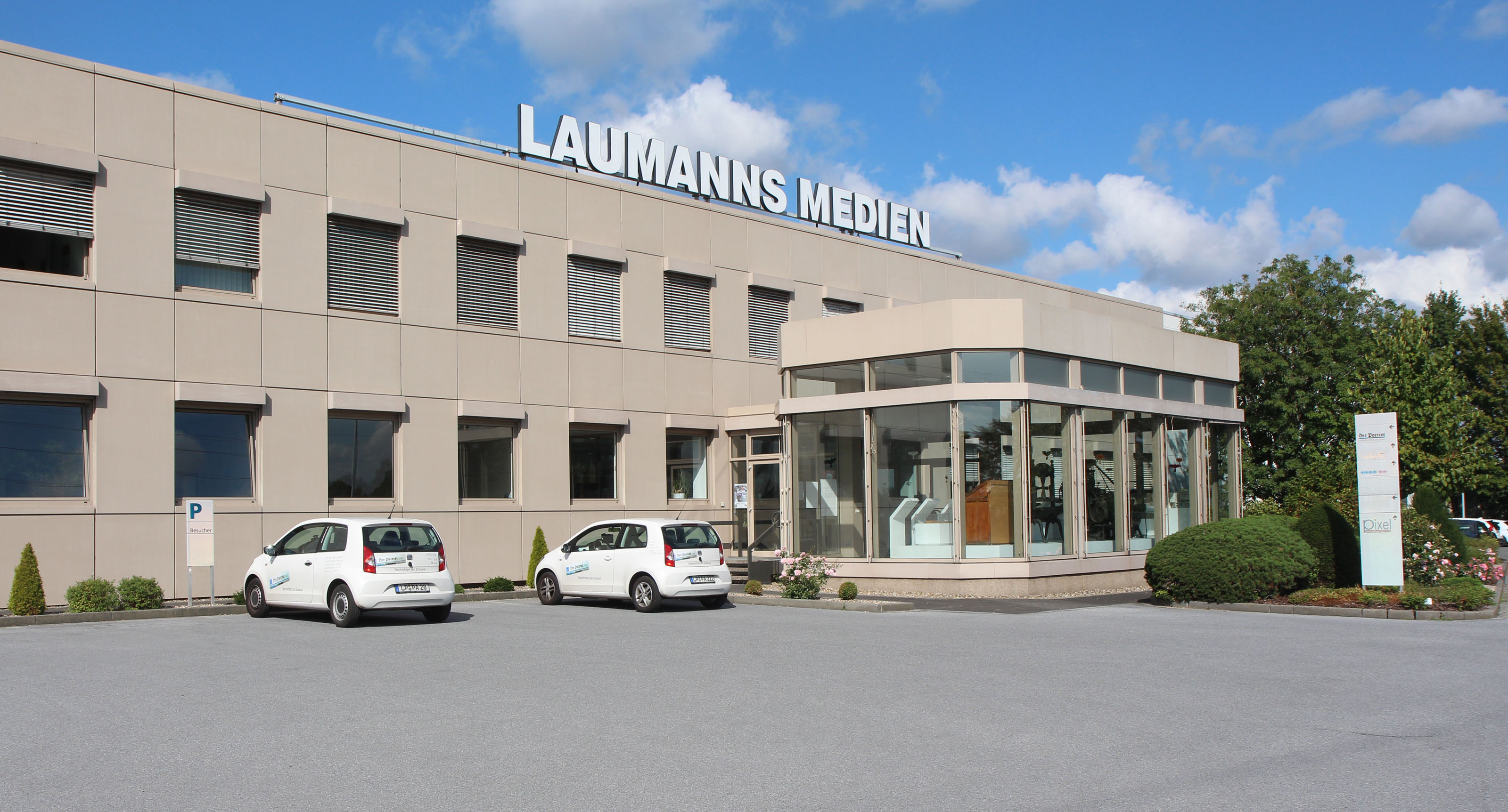 Hauptsitz des Verlages: Hansastraße 2 in 59557 Lippstadt